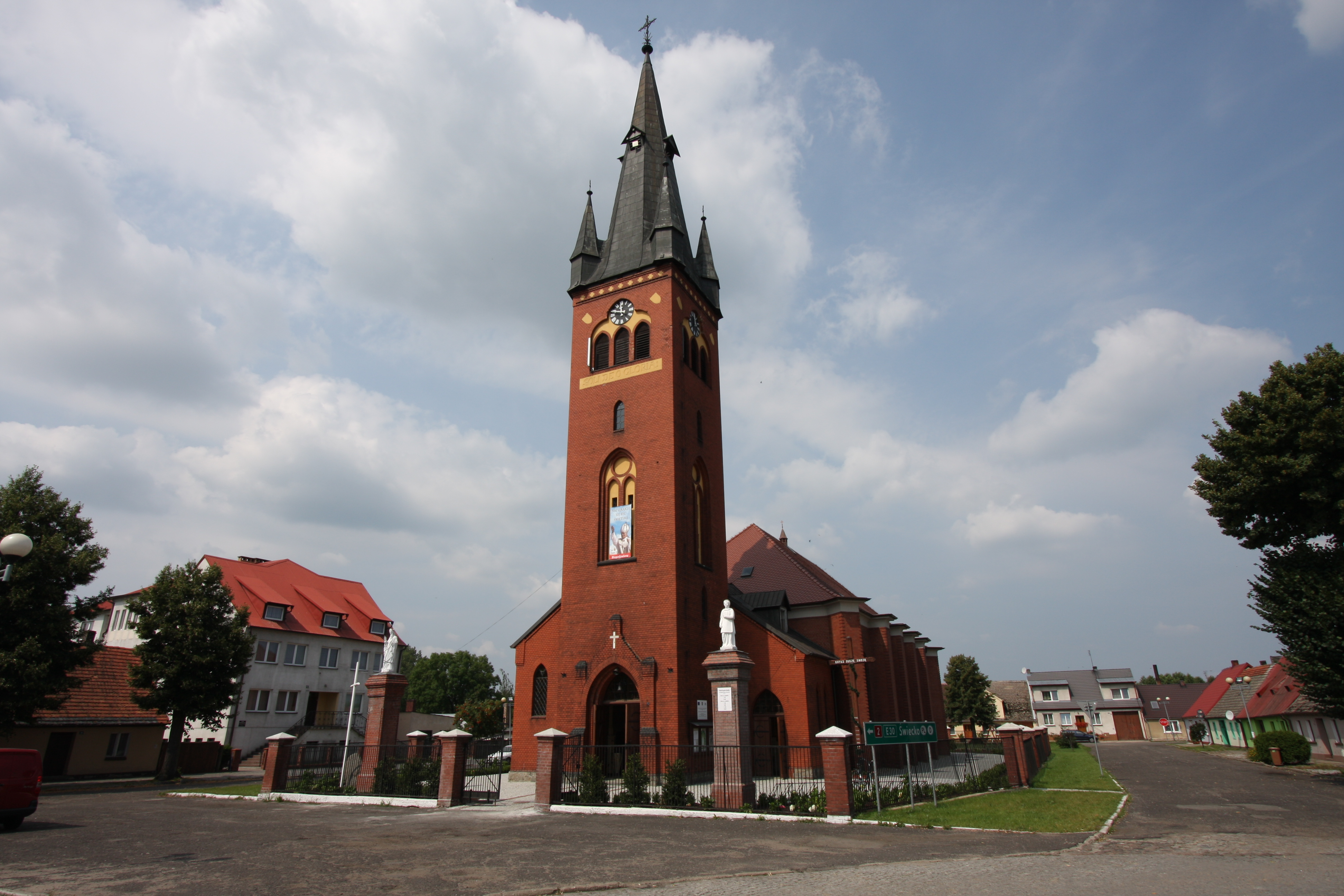 Trzciel, kościół par. p.w. św. Wojciecha, mur.-szach., 1824, 1900-1901, 1928-1929, pl. Wolności 8